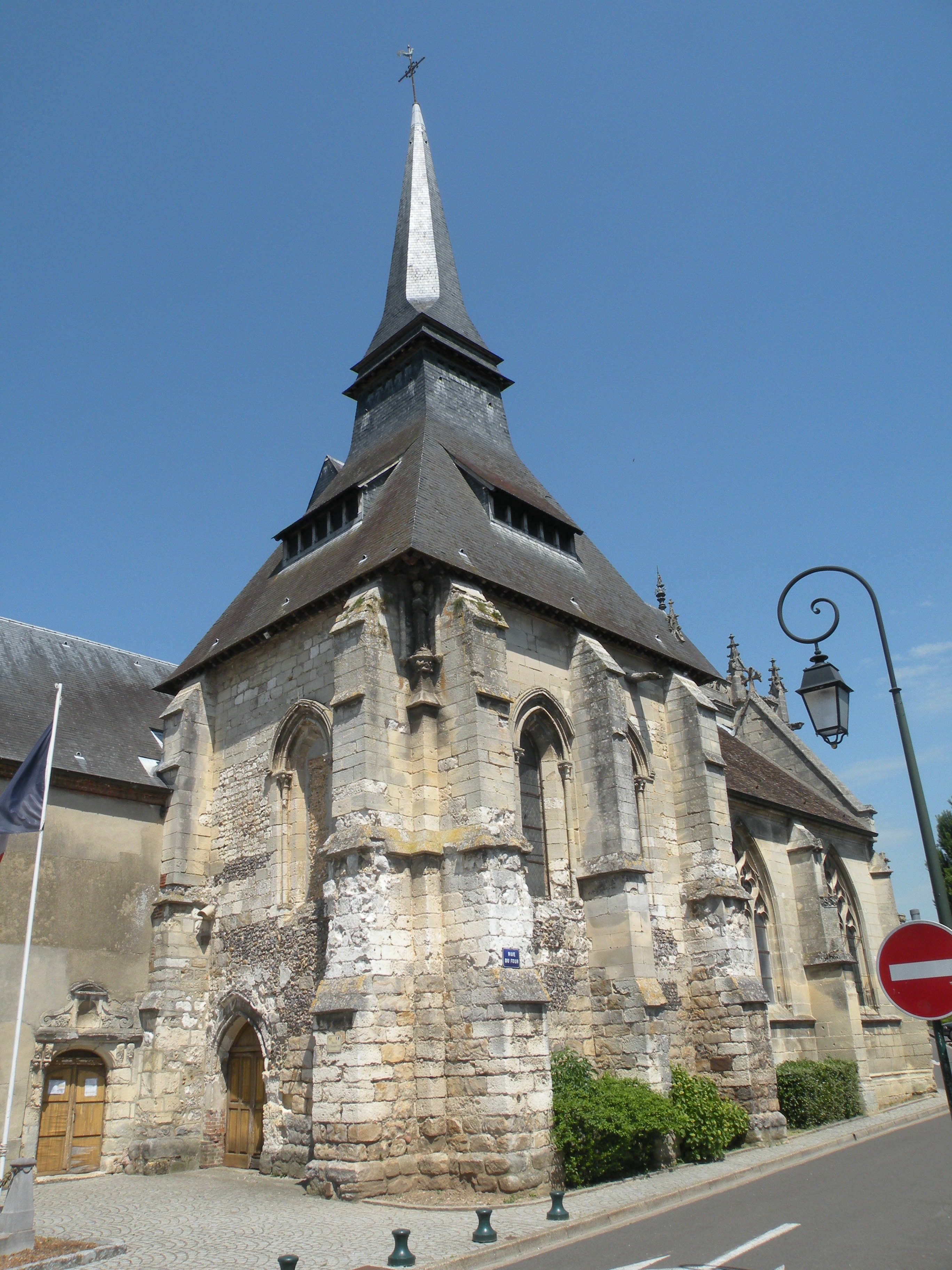 Église Saint-Denis de Sérifontaine